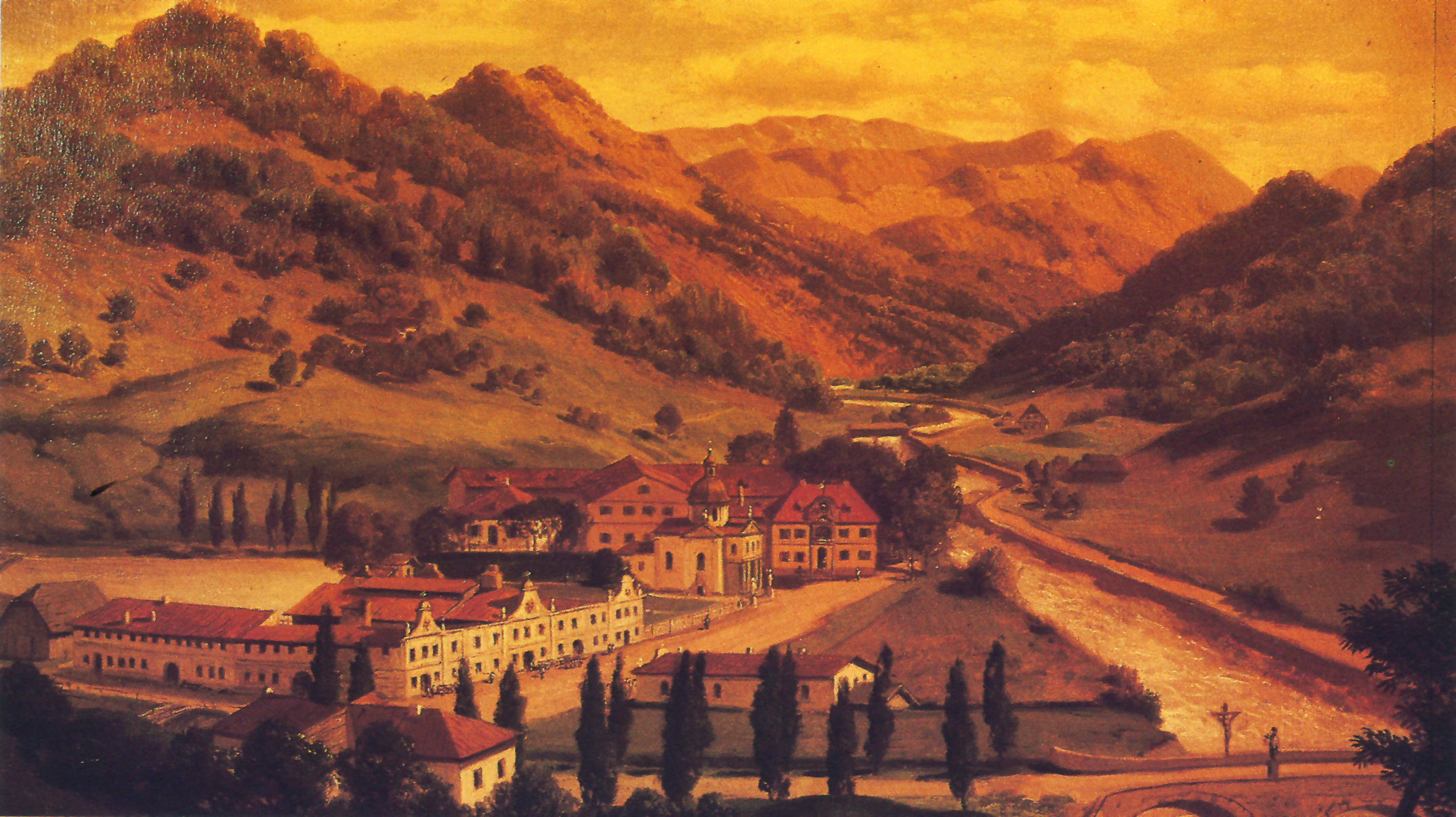 Schloss Neubruck und Töpperwerk